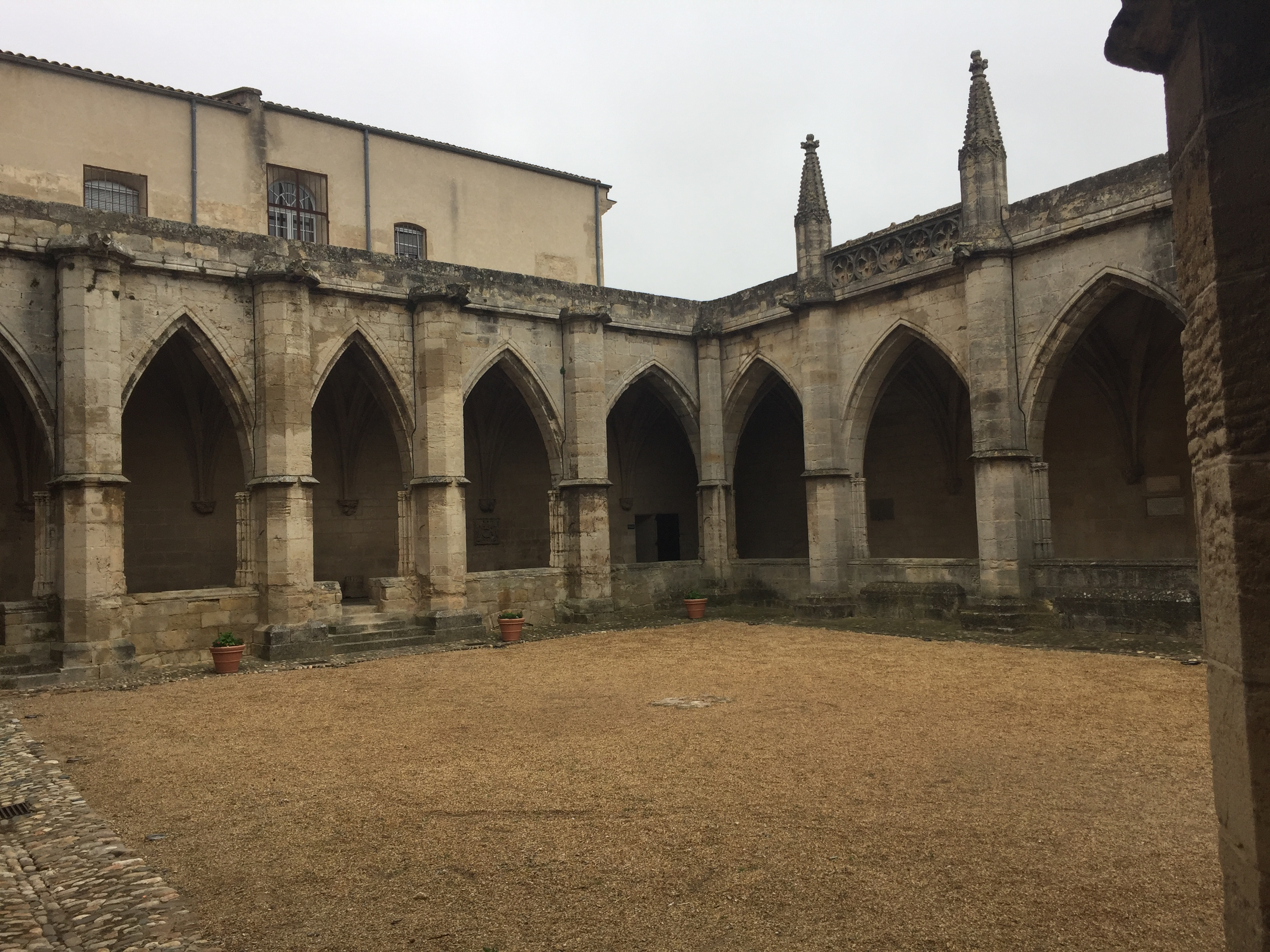 Cloître de la cathédrale saint nazaire de Béziers